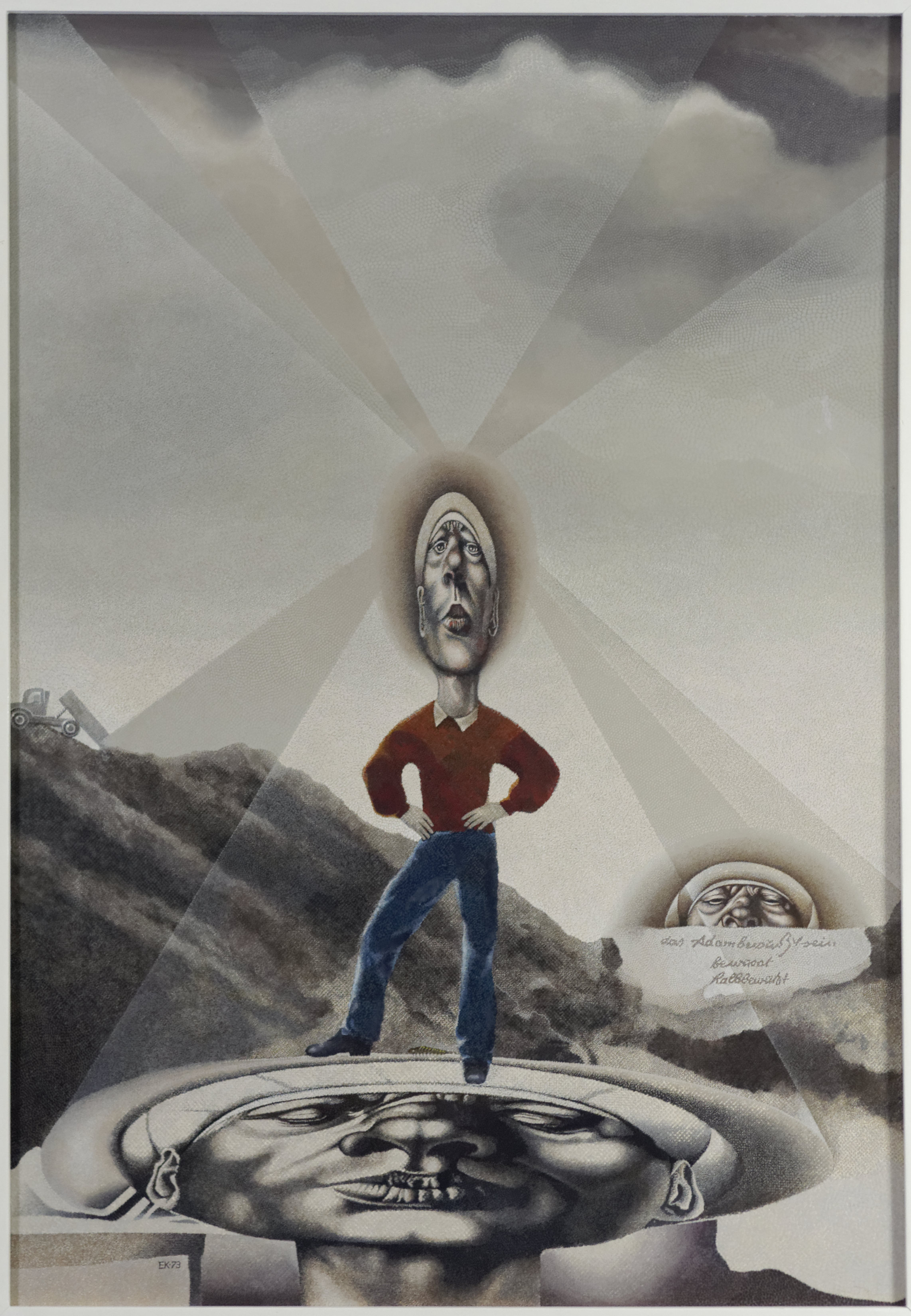 Das Bildnis des Herrn A. nach der Entstörung seines Selbstverständnisses, Öl auf Karton, 1973 (79 × 114 cm) „... Das Bild bezieht sich mit freundlicher Ironie auf einen Star des modernen Kunstmarktes: Nicht Karsten hat die wie in der Zentrifuge verformten Kopie erfunden, sondern ein Protagonist der Wiener Phantastischen Schule »Rudolf Hausner, der sich mit einem Adam-Komplex herumschlägt. Seine wirbelnden Flachköpfe können schon zum Spott reizen«, so Emil F. Karsten...“, »Weser-Kurier«, 142, 19. Juni 1973. – Das Bild wurde auf der Basler Kunstmesse 1973 ausgestellt.